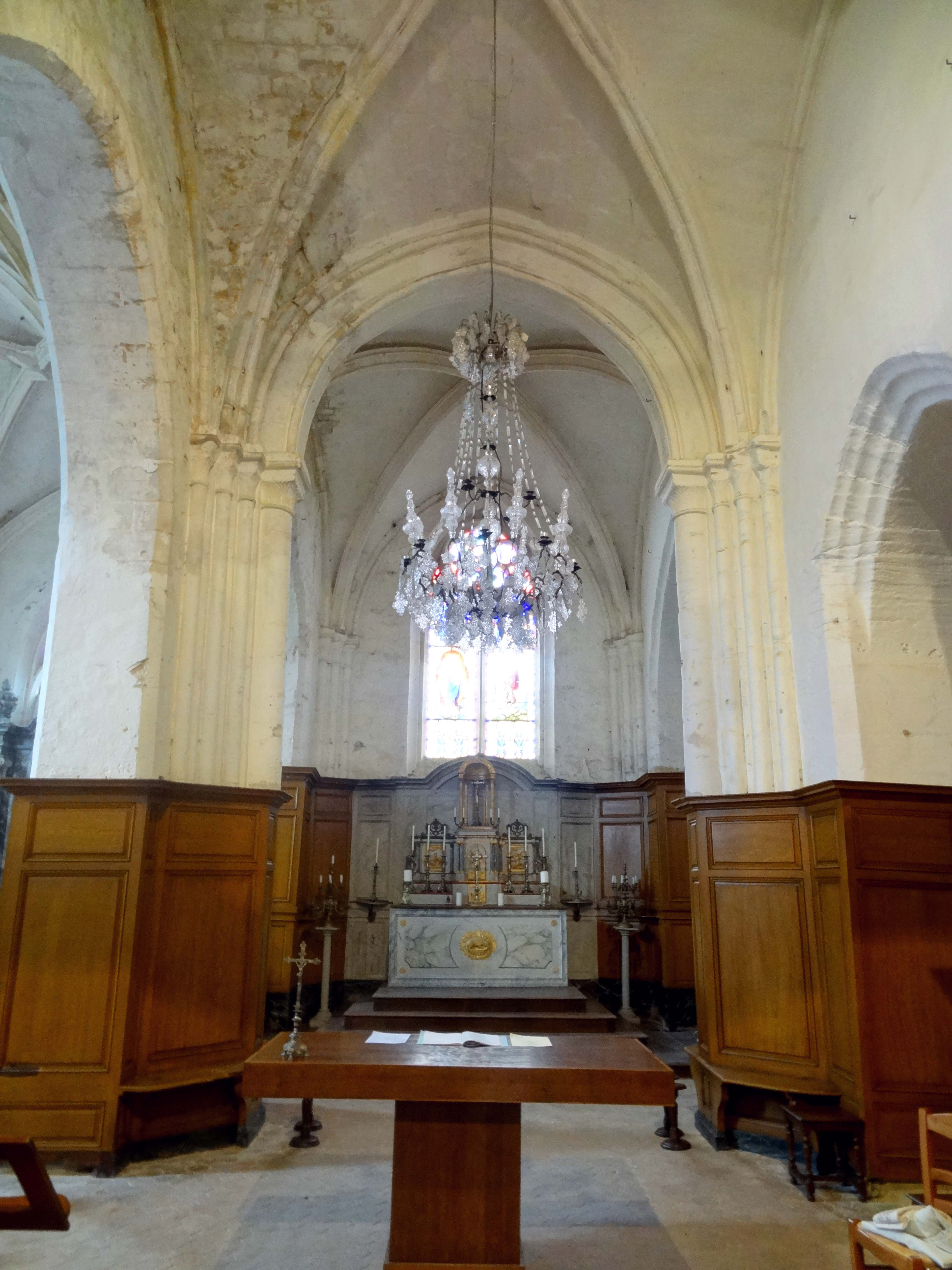 Intérieur de l'église - voir titre.